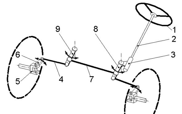 Lenkung, schematisch , mit 2 Spurstangwen und einer Zwischenstange